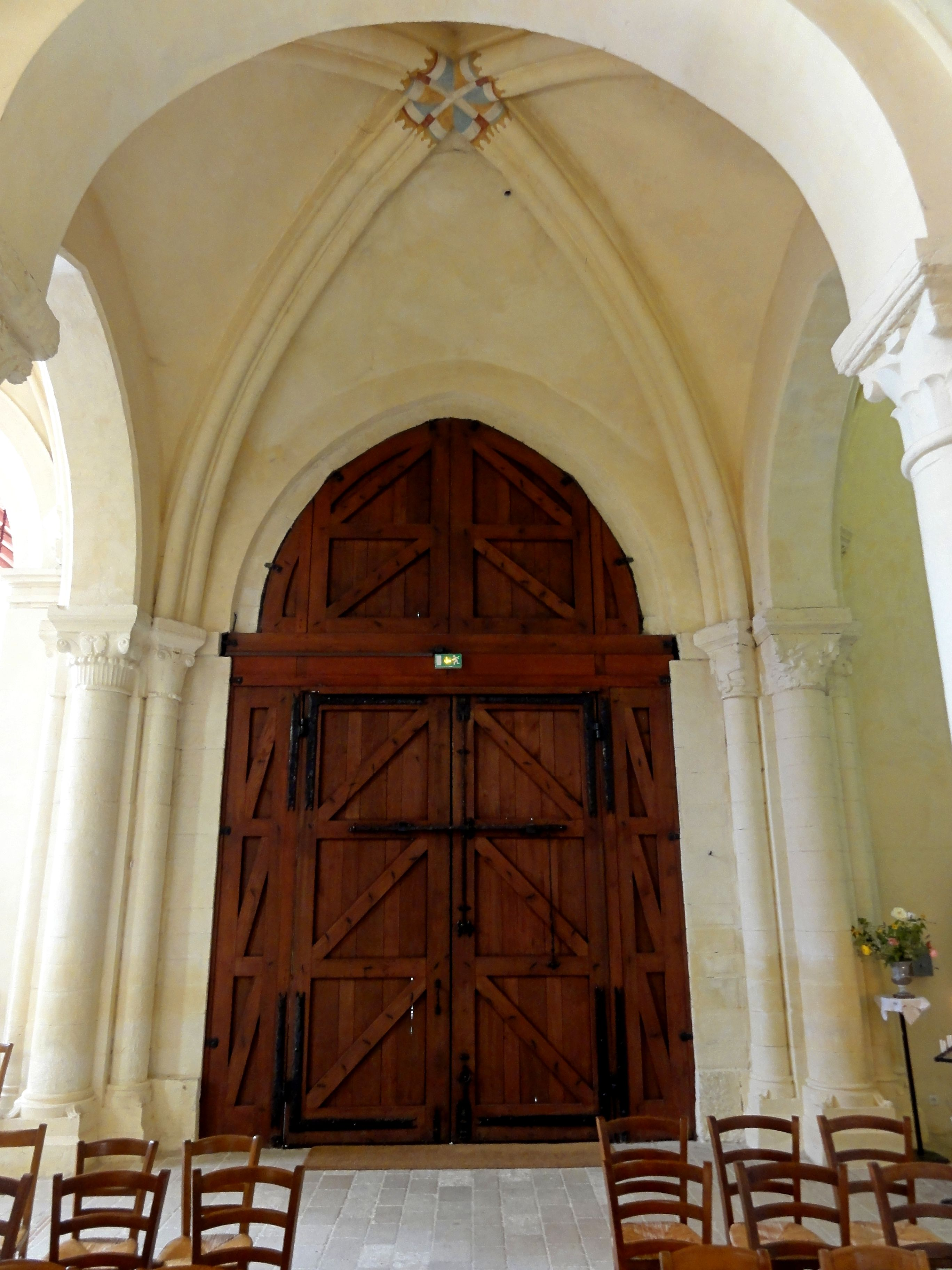 Croisée du transept, vue vers l'ouest sur le portail occidental de 1905 ; avant, s'y trouvait l'arcade ouvrant dans la nef des années 1130 / 1140, démolie en 1904 pour vétusteté.